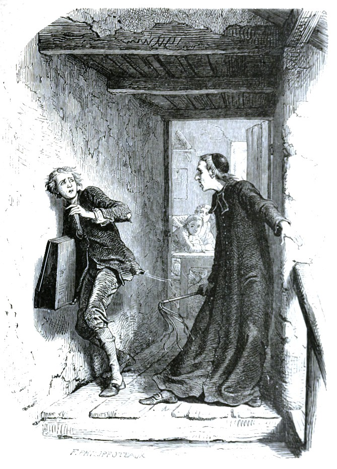 Illustration d'Héliodore Pisan pour l'édition de 1880 de Ange Pitou, roman d'Alexandre Dumas père.